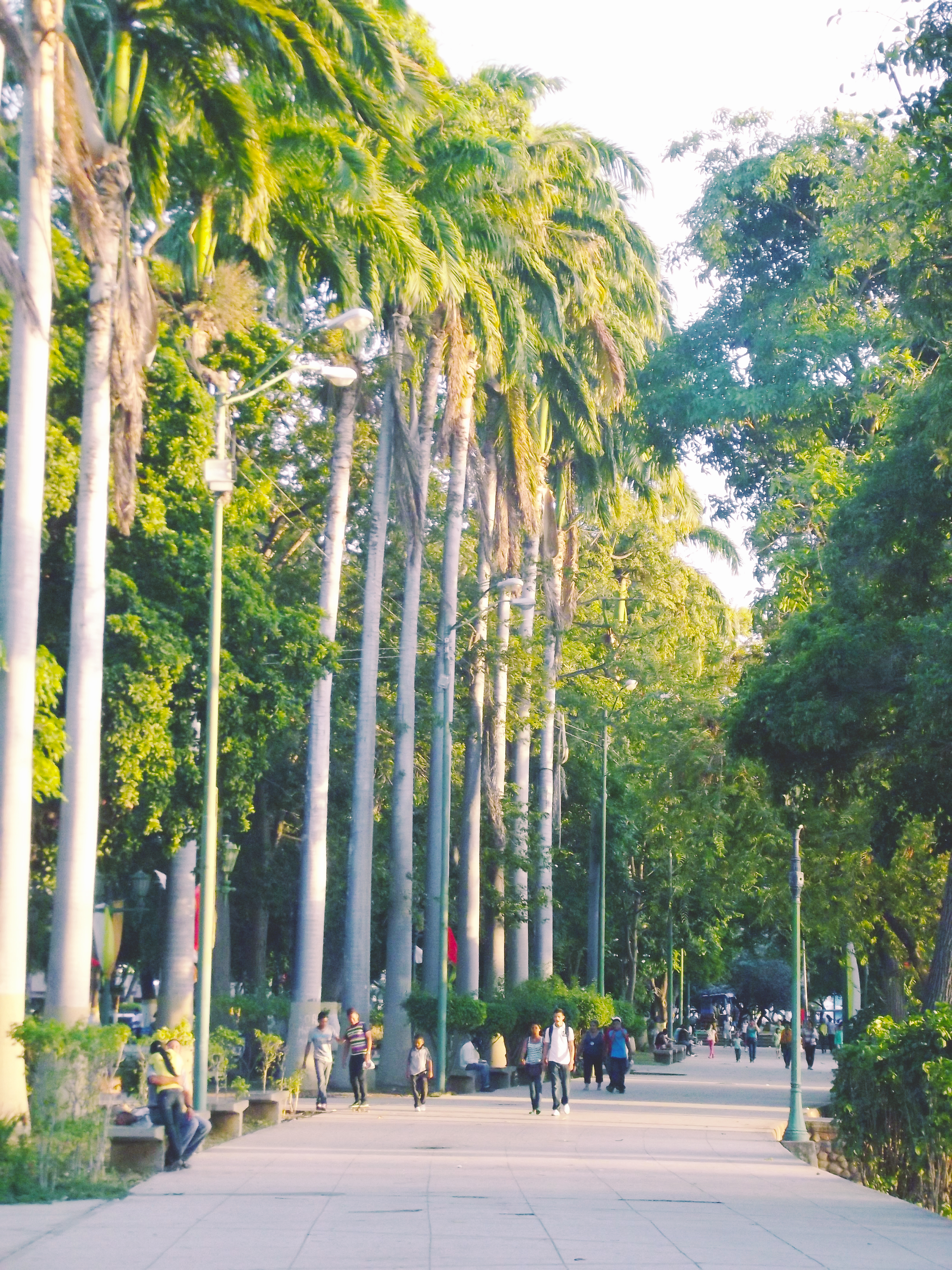 Cumaná, Venezuela.